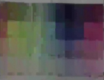 Compresión realizada con el códec Cinepk.